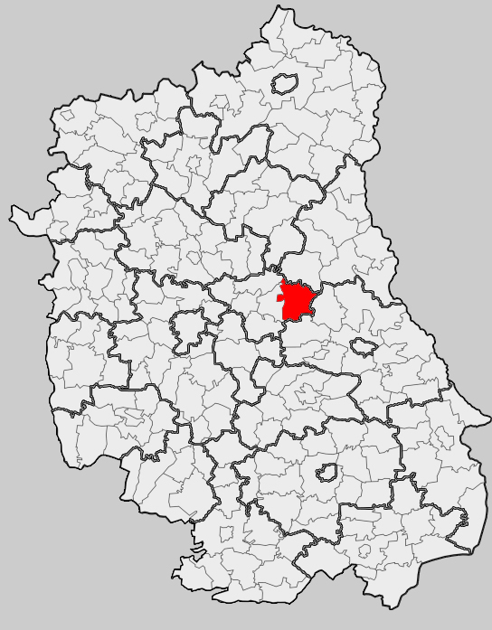 Map of gmina Cyców, Łęczna county, Lublin voivodship Mapa gminy Cyców, powiat łęczyński, województwo lubelskie